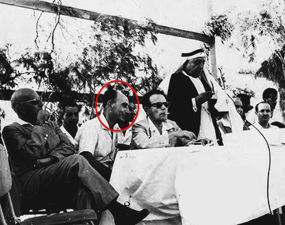 1961 - מפגש במגזר הערבי באום-אל-פאחם עם אהרן בקר